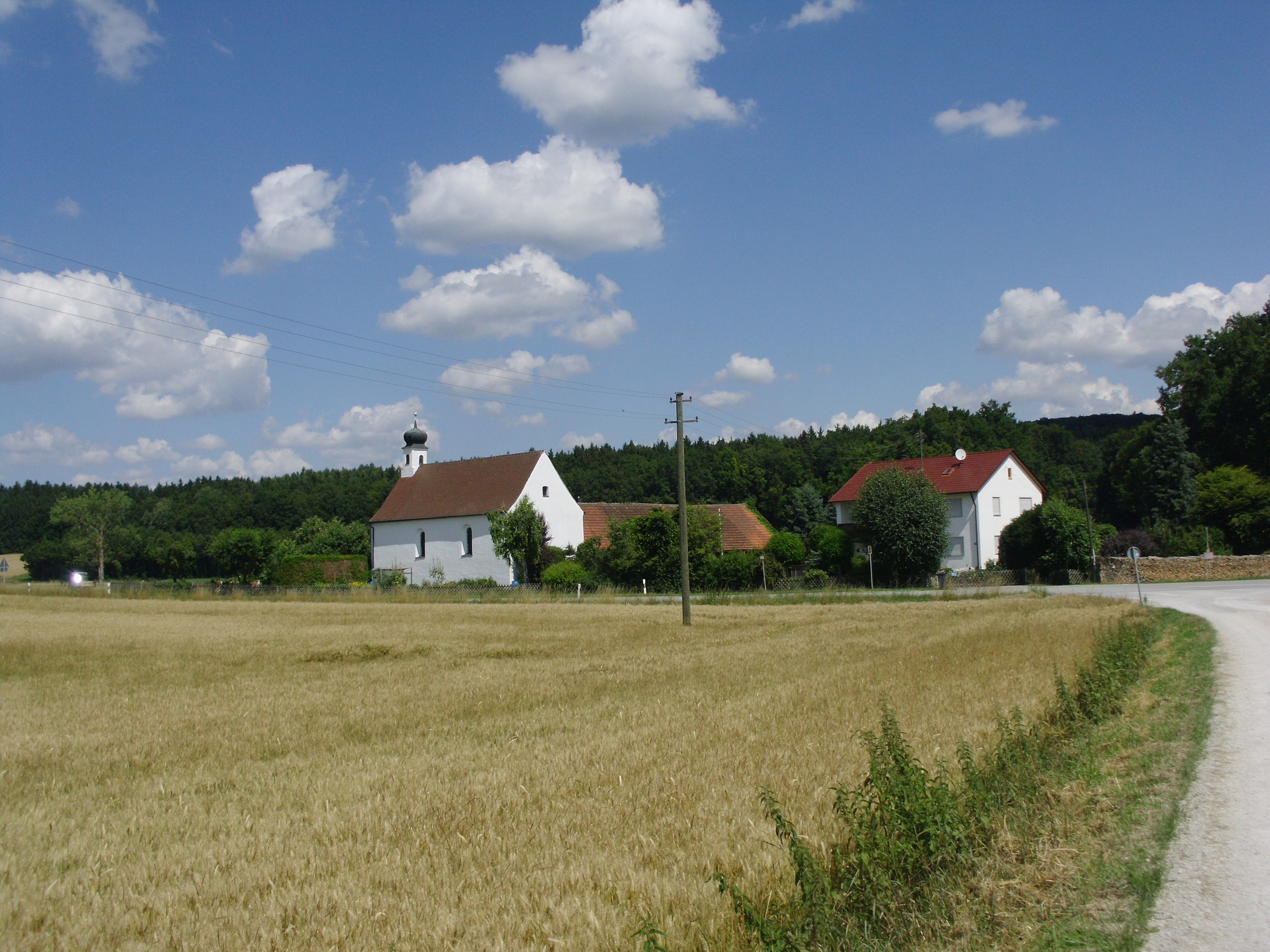 St. Lorenzi, Ortsteil von Oberdolling im oberbayerischen Landkreis Eichstätt